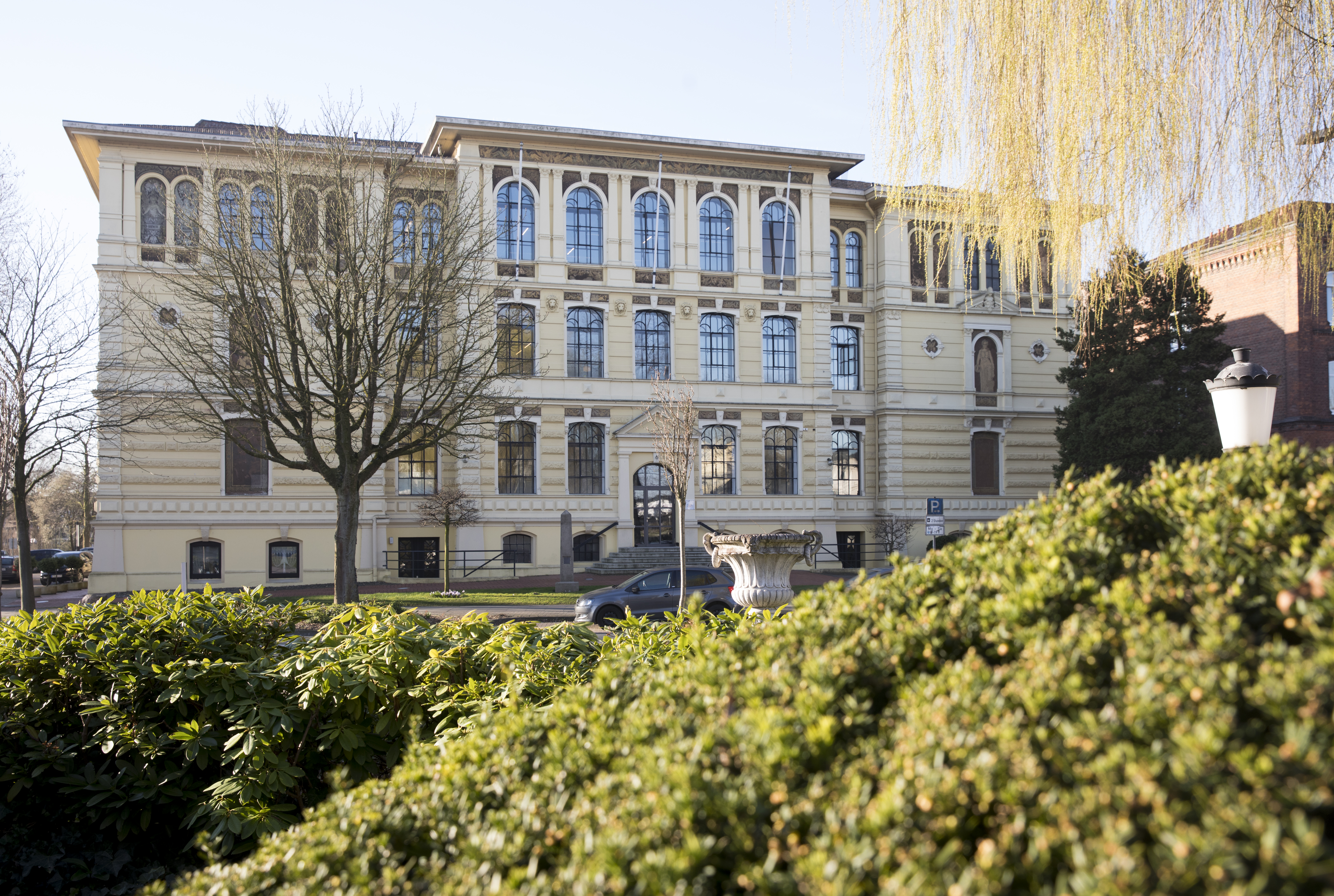 Hauptgebäude der hochschule 21 in Buxtehude